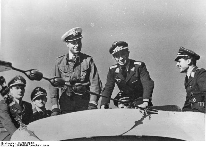 Werner Henke und Piloten an Bord eines U-Bootes Eichenlaubträger Kapitänleutnant Henke hat an Bord seines U-Bootes Besuch bekommen. Es sind die Fernjäger des Atlantiks, die bei der nächsten Ausfahrt des Bootes Geleit fliegen werden. Eine herzliche Kameradschaft verbindet U-Boot-Männer mit diesen Fliegern. 6.1.1944 [Herausgabedatum] [Kapitänleutnant Werner Henke und Piloten (u.a. Oberleutnant der Luftwaffe) an Bord eines U-Boots] Abgebildete Personen: Henke, Werner: Kapitänleutnant, Ritterkreuz (RK), Marine, Deutschland (GND 119182521)